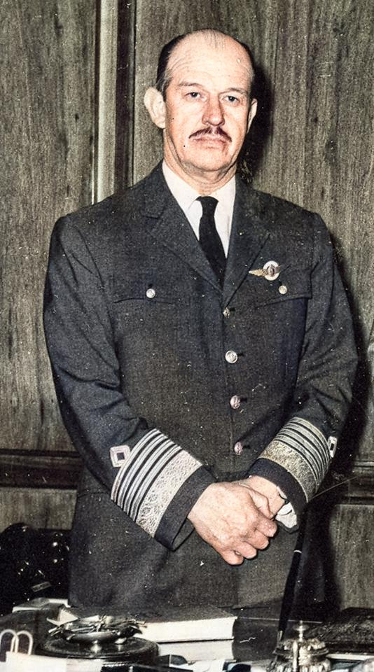 El Brigadier General Cayo Antonio Alsina.